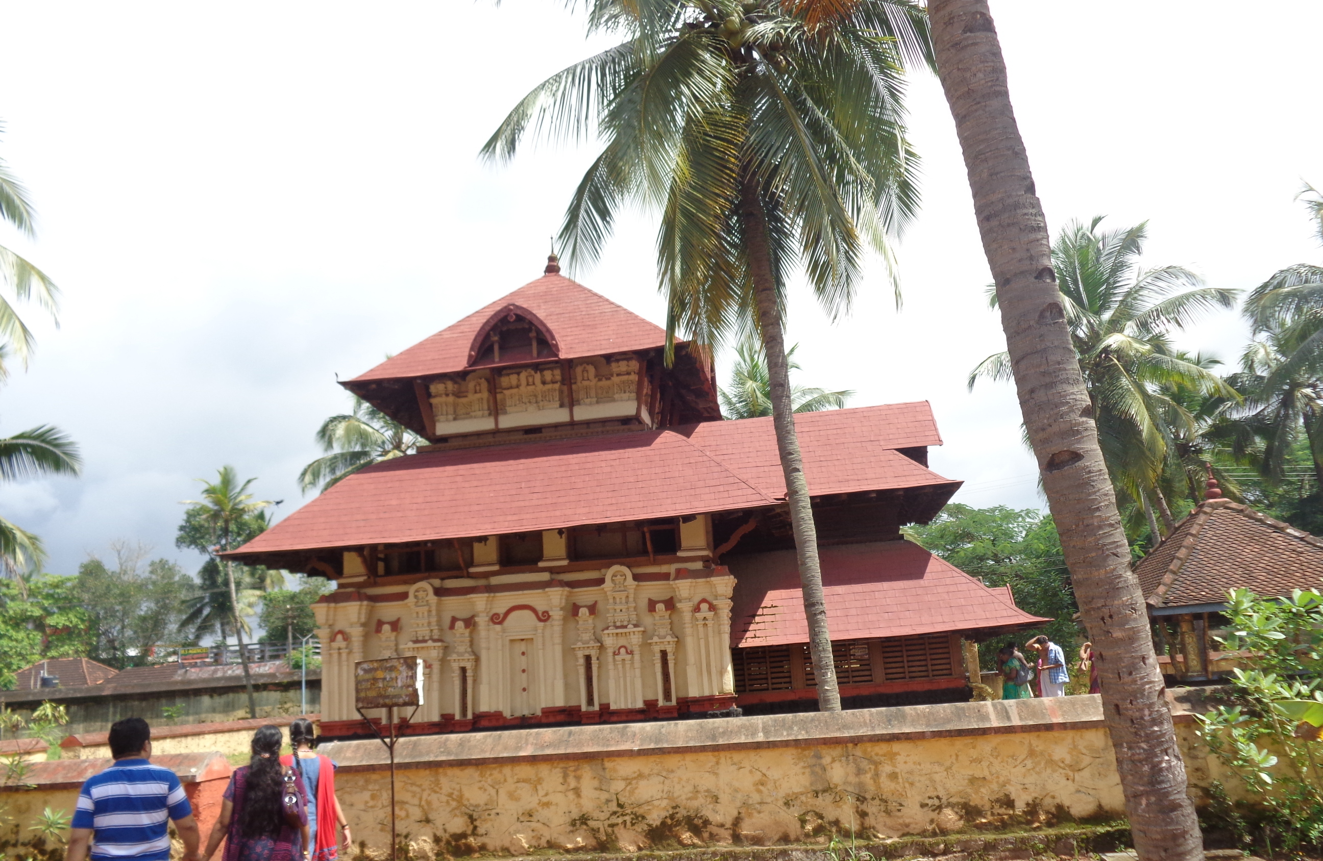 krishna temple at trkkurutti temple, mannar